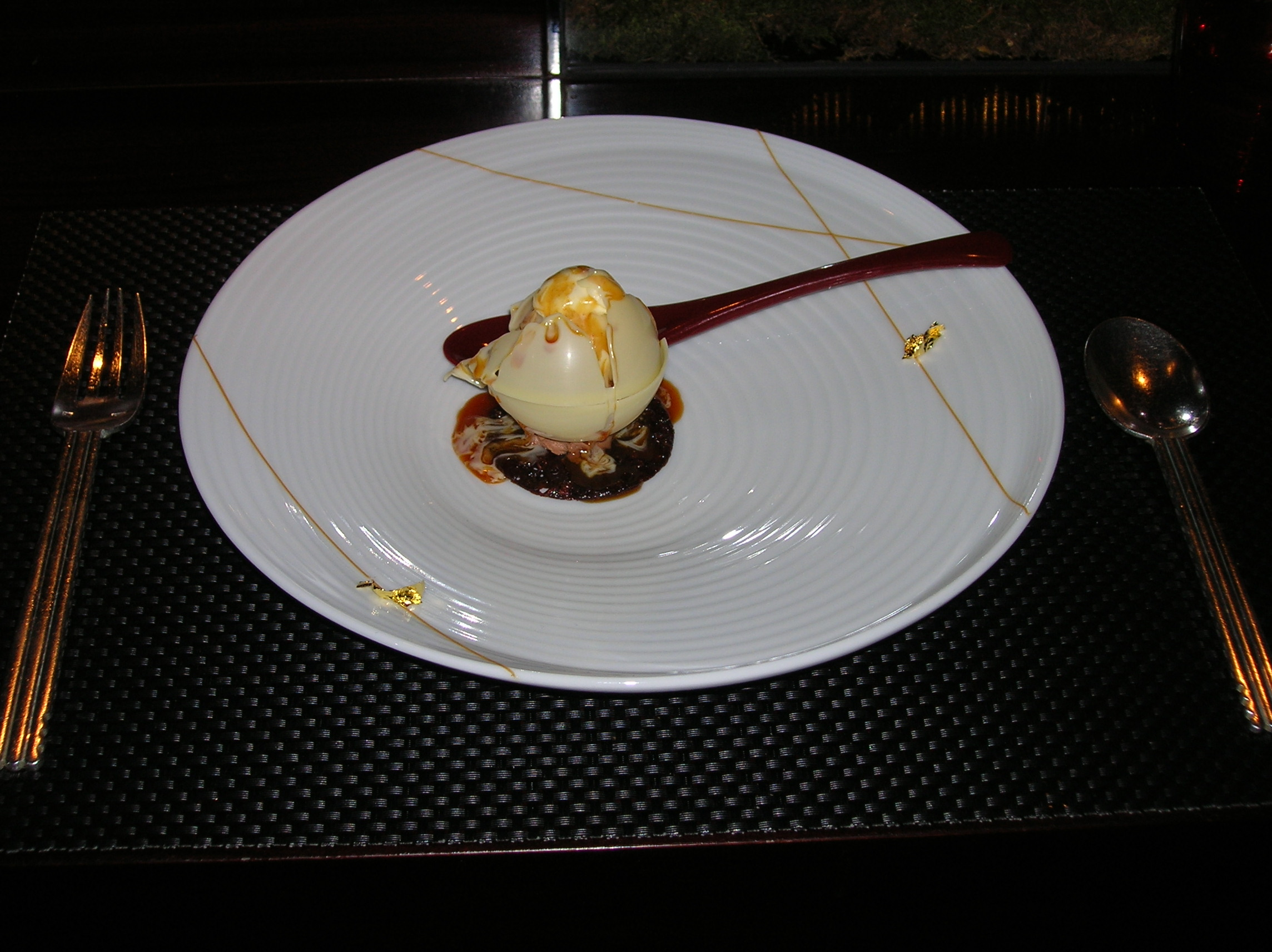 קינוח באטליה של רובינשון בהונג קונג